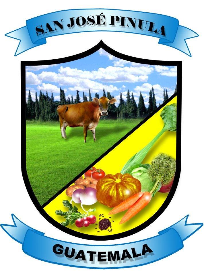 Escudo de San Josè Pinula, Guatemala, Guatemala.